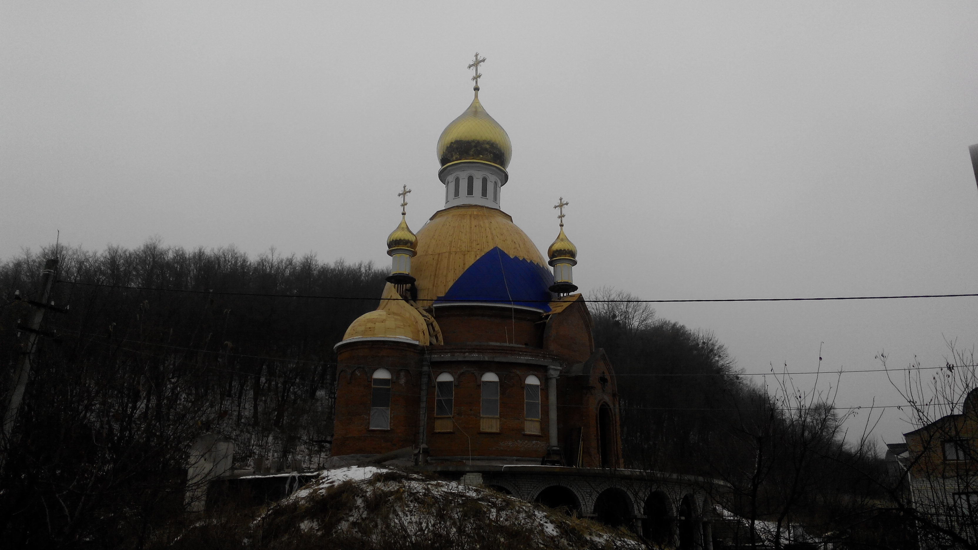 Україна. Зміївський район. с. Водяне. Борисоглібський монастир. Храм Преображення Господнього. 2014